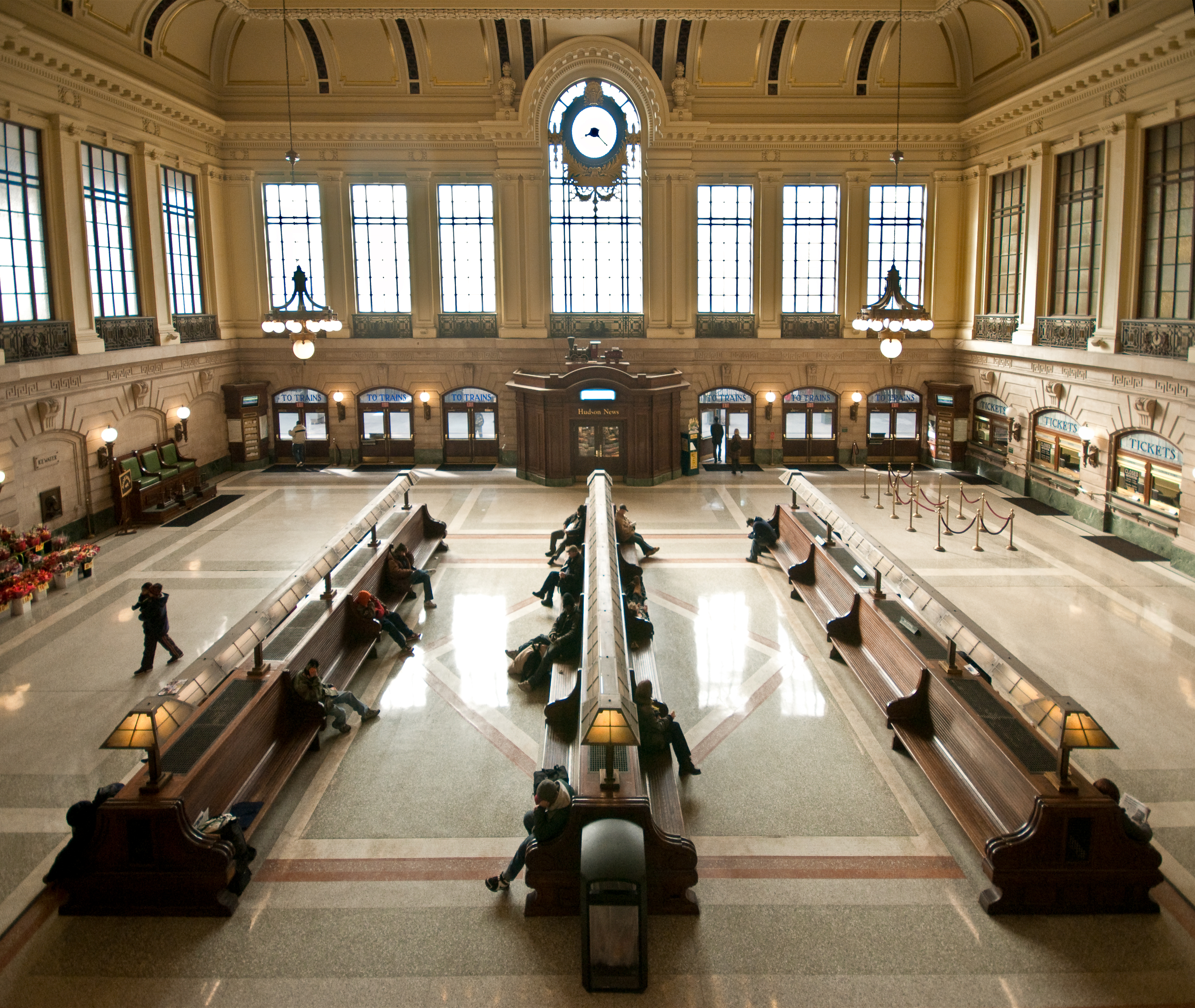 Looking east in Hoboken Terminal waitingroom